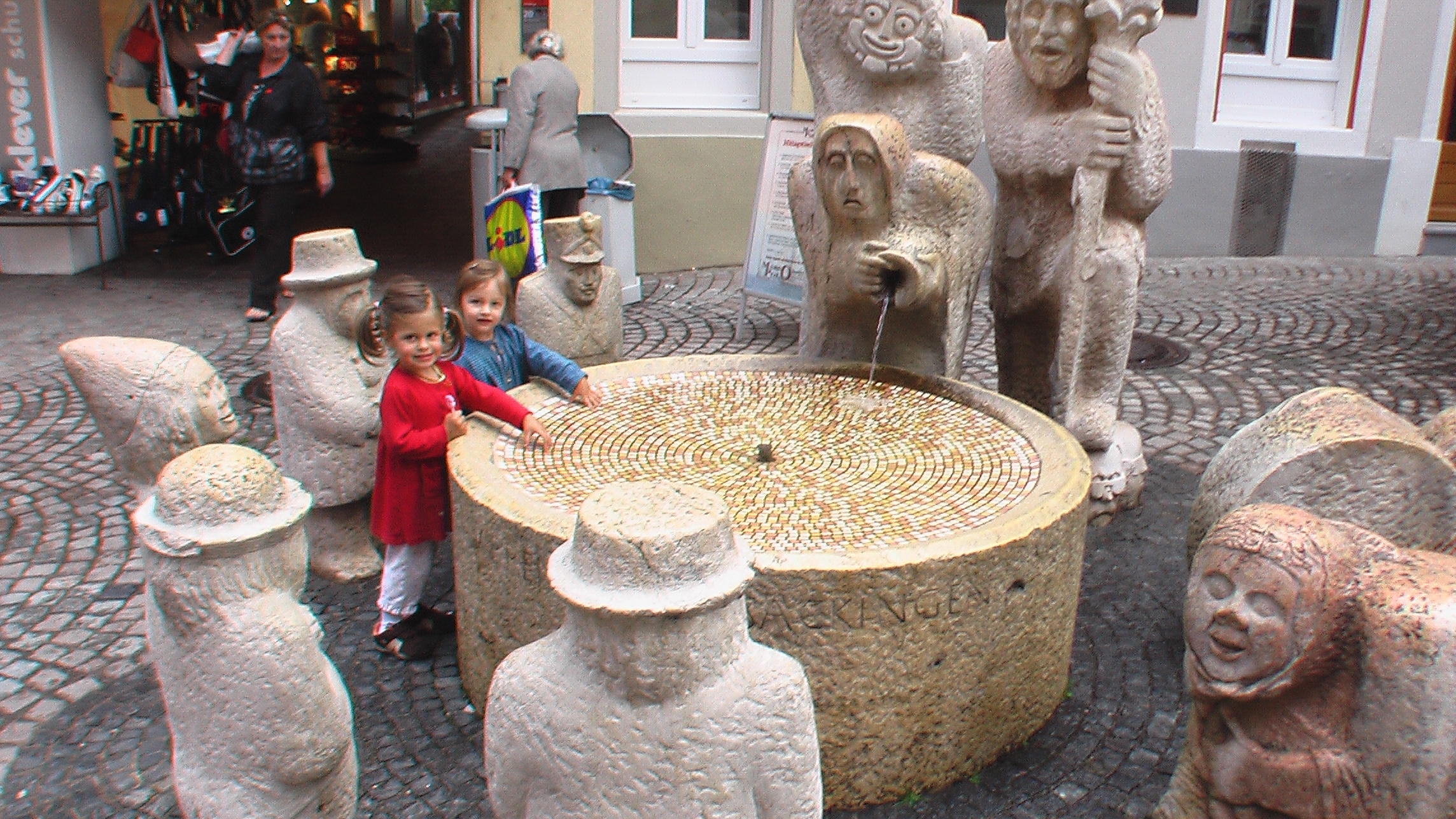 Narrenbrunnen in Bad Säckingen, 1973 von Leonhard Eder; 1974 an die heutige Stelle versetzt